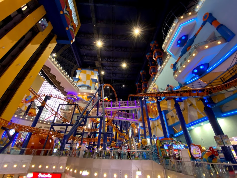 吉隆坡時代廣場室內遊樂場